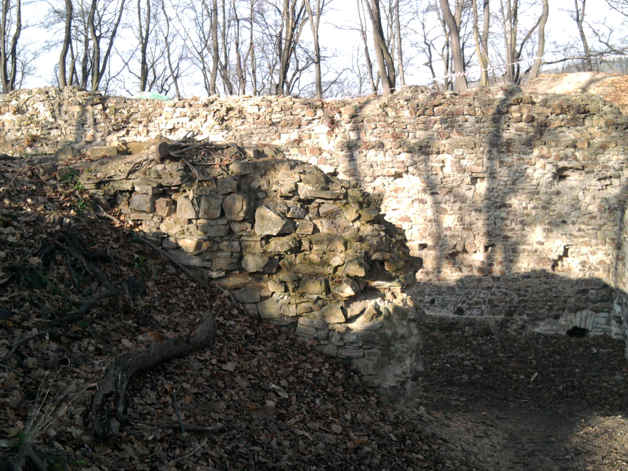 Podzimní pohled na zříceninu Nového hradu